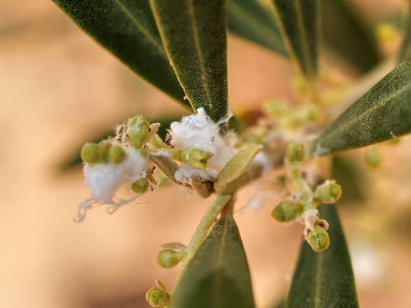 Secreciones cerosas de larvas de Euphyllura olivina o algodoncillo en flores de olivo (Oleae europaea)